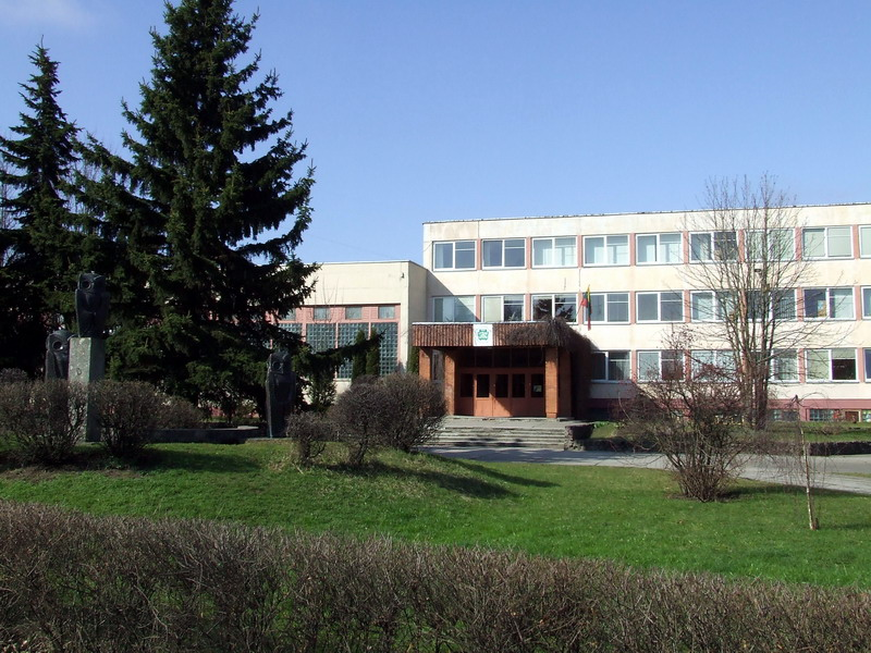 Vytauto Didžiojo universiteto Rasos gimnazija